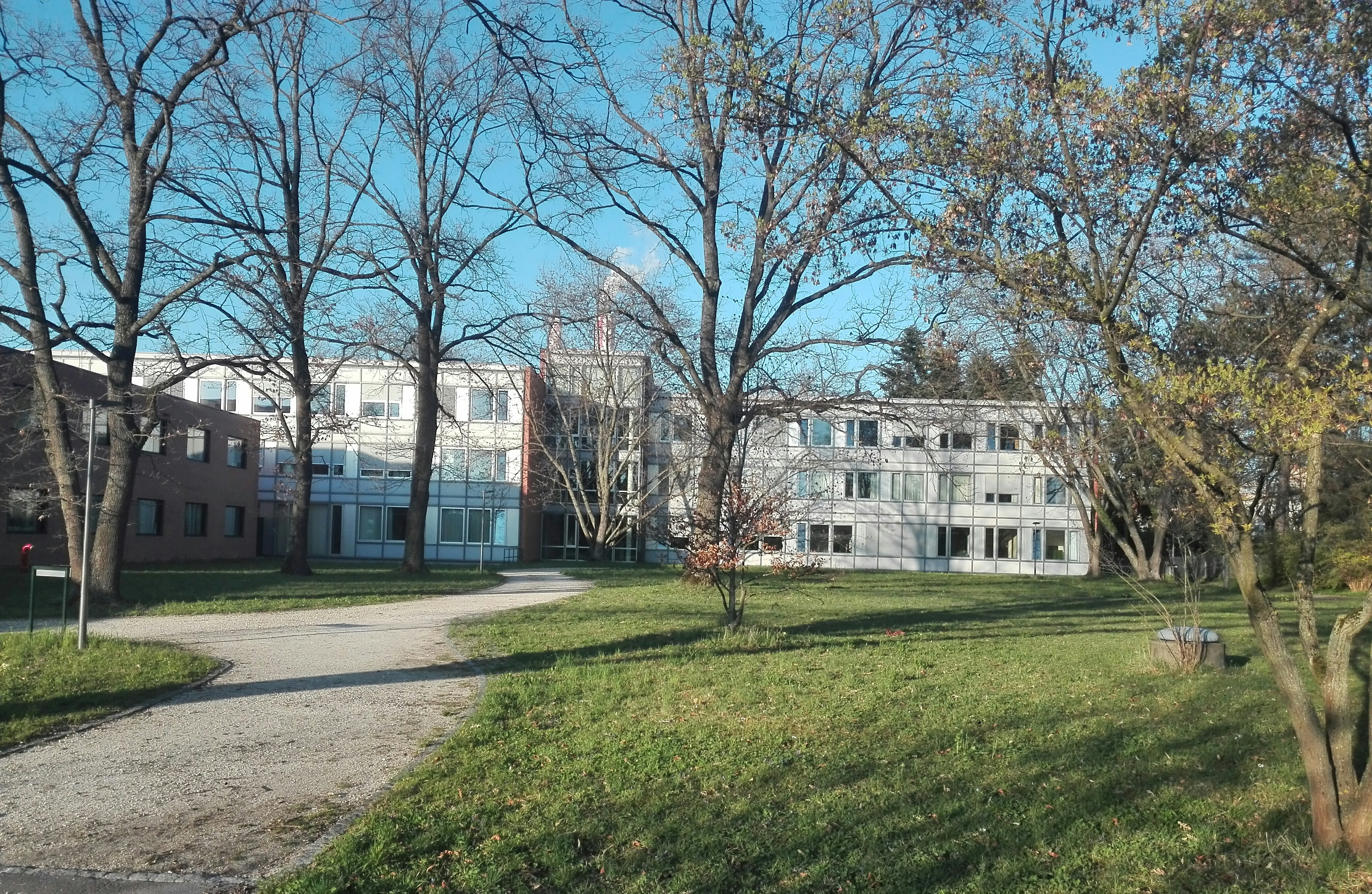 Universitäre Psychiatrische Kliniken (UPK) Basel